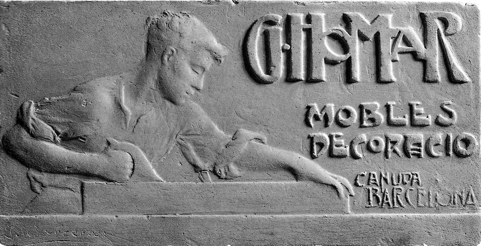 Imatge publicitaria del taller de Gaspar Homar